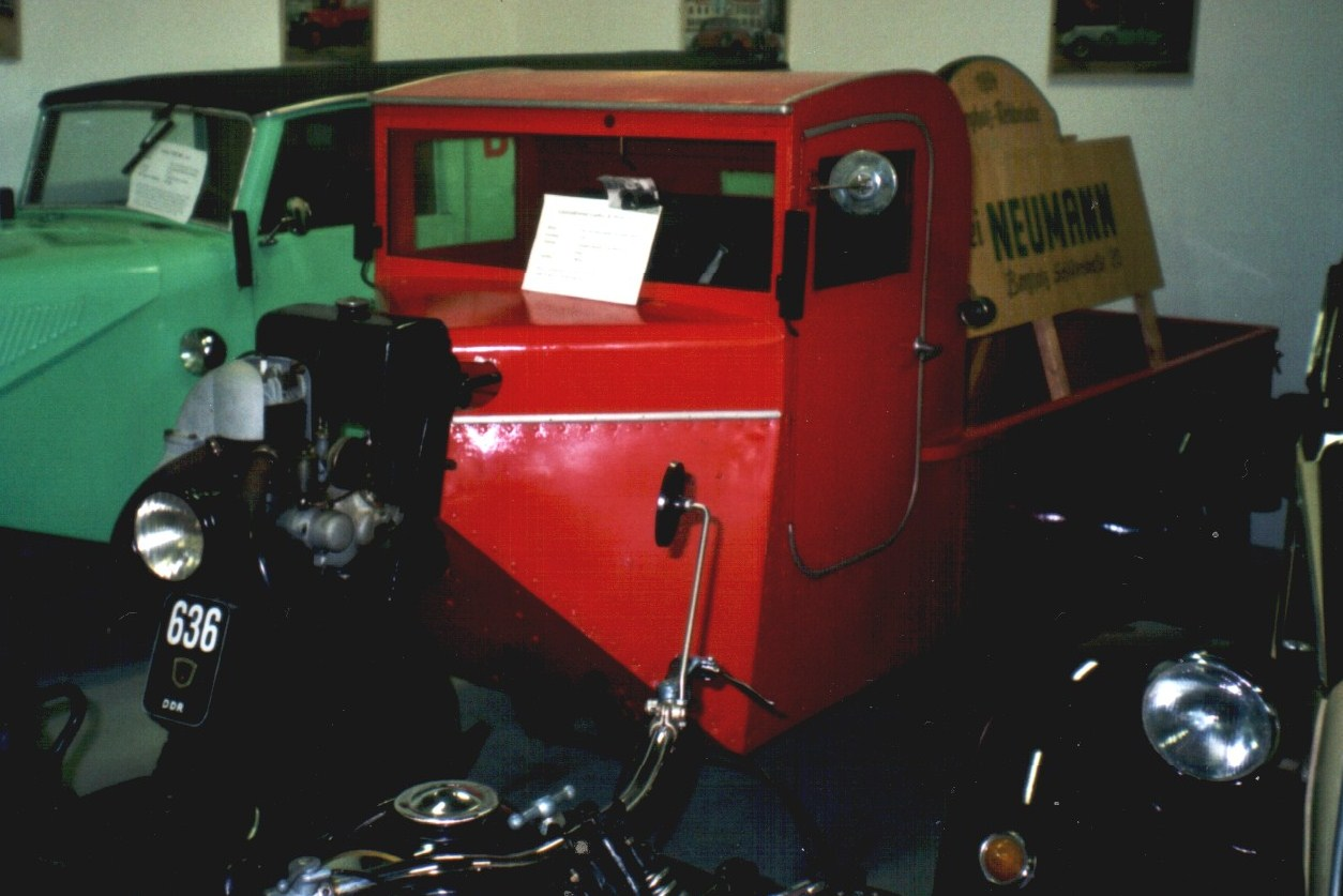 Luther & Heyer Lieferwagen von 1932